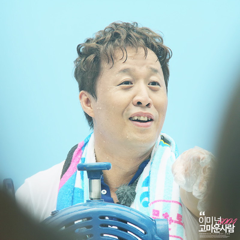 2014 무한도전 팥빙수 이벤트